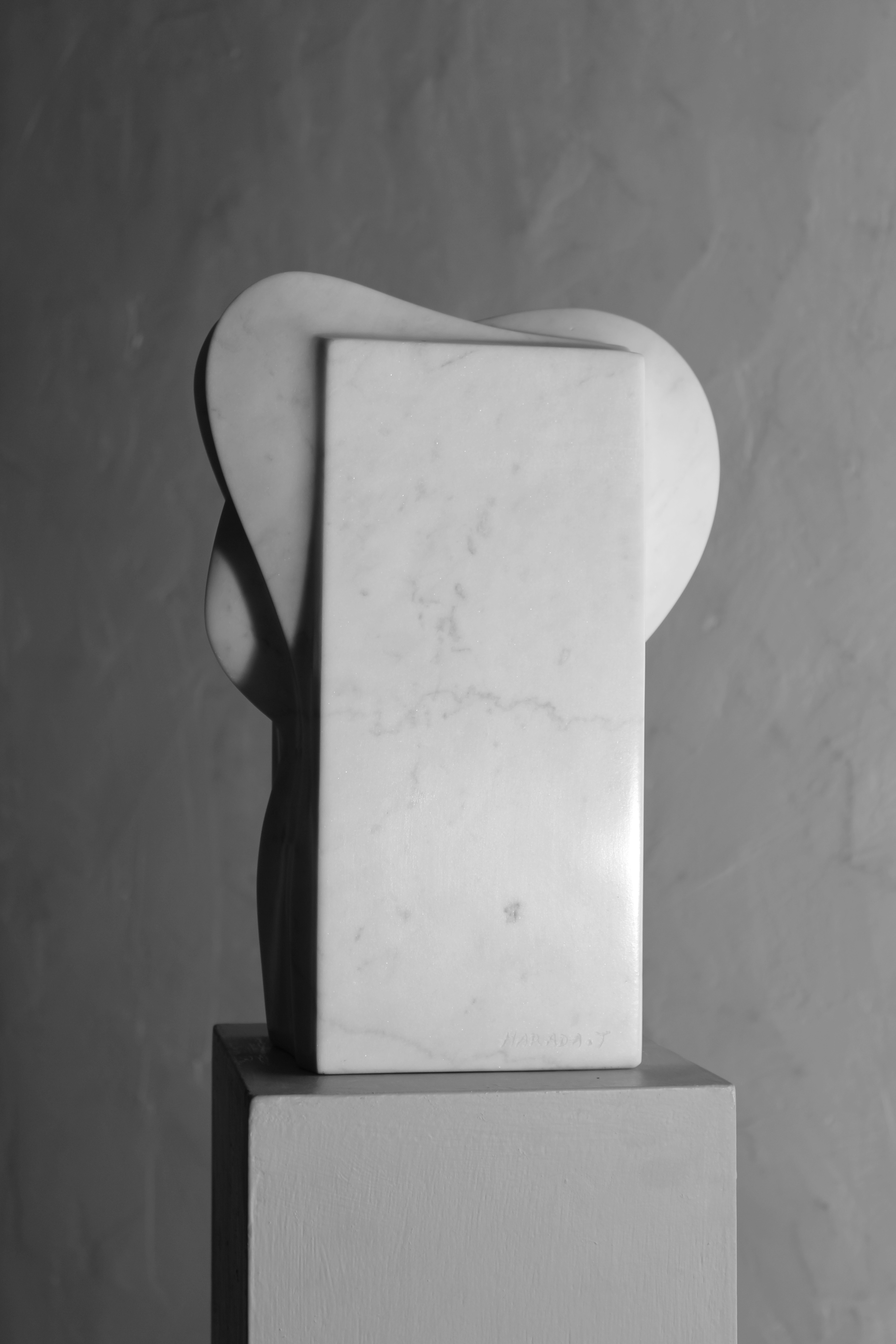 Sculpture Friendship ("Amitié") 1999 Tetsuo Harada, sculpteur français d'origine japonaise. Sculpture en taille directe. Marbre blanc de Carrare (Italie). L18 x l12 x H35 cm. Taillée à Fresnay l'Evêque, Eure-et-Loir (Beauce) 28310, France. Photographie: 2012 Avril 7, Cesar Harada, deuxième fils d'Annie et Tetsuo Harada.